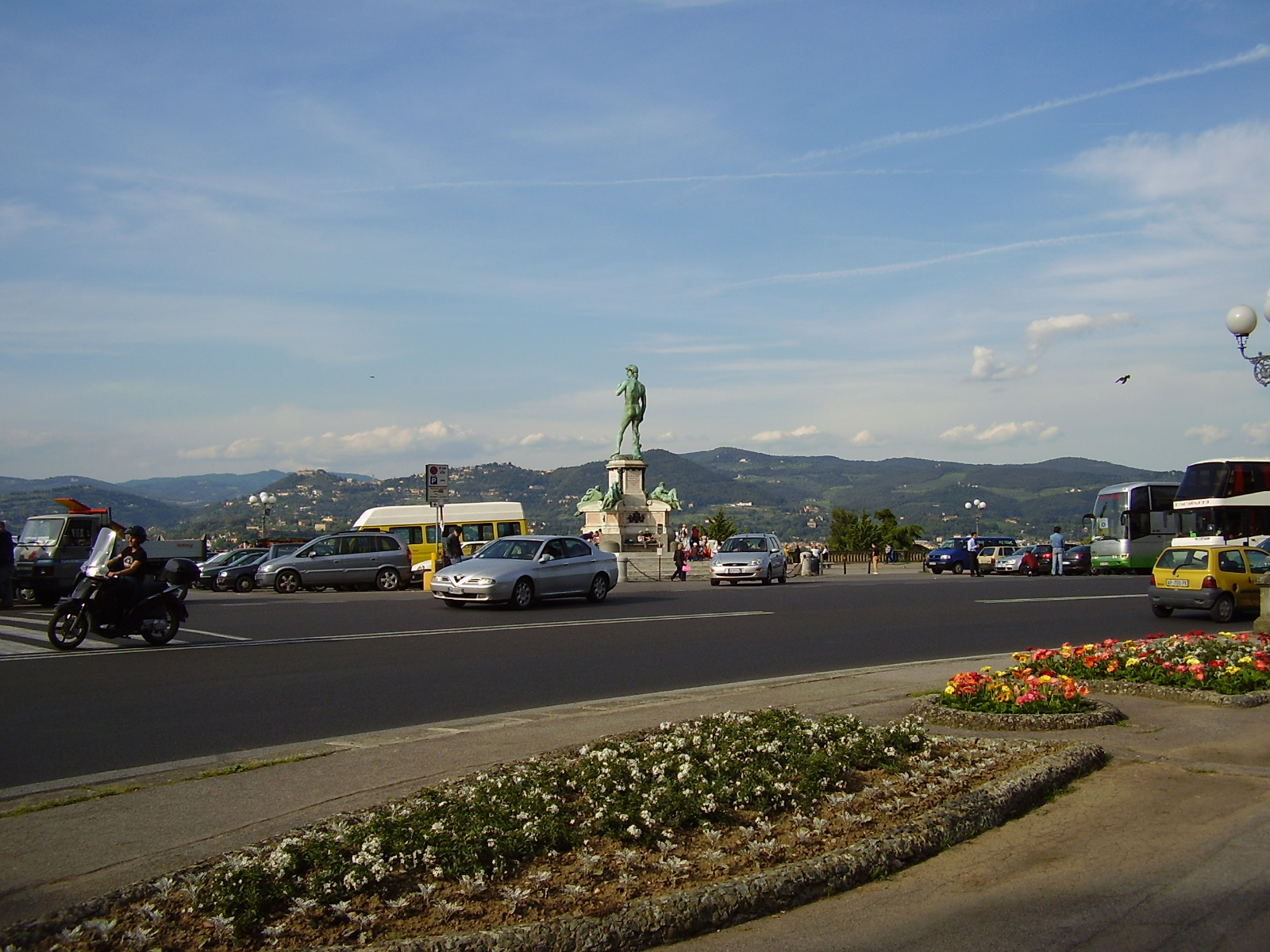 Piazzale Michelangelo, from Florence, Italy